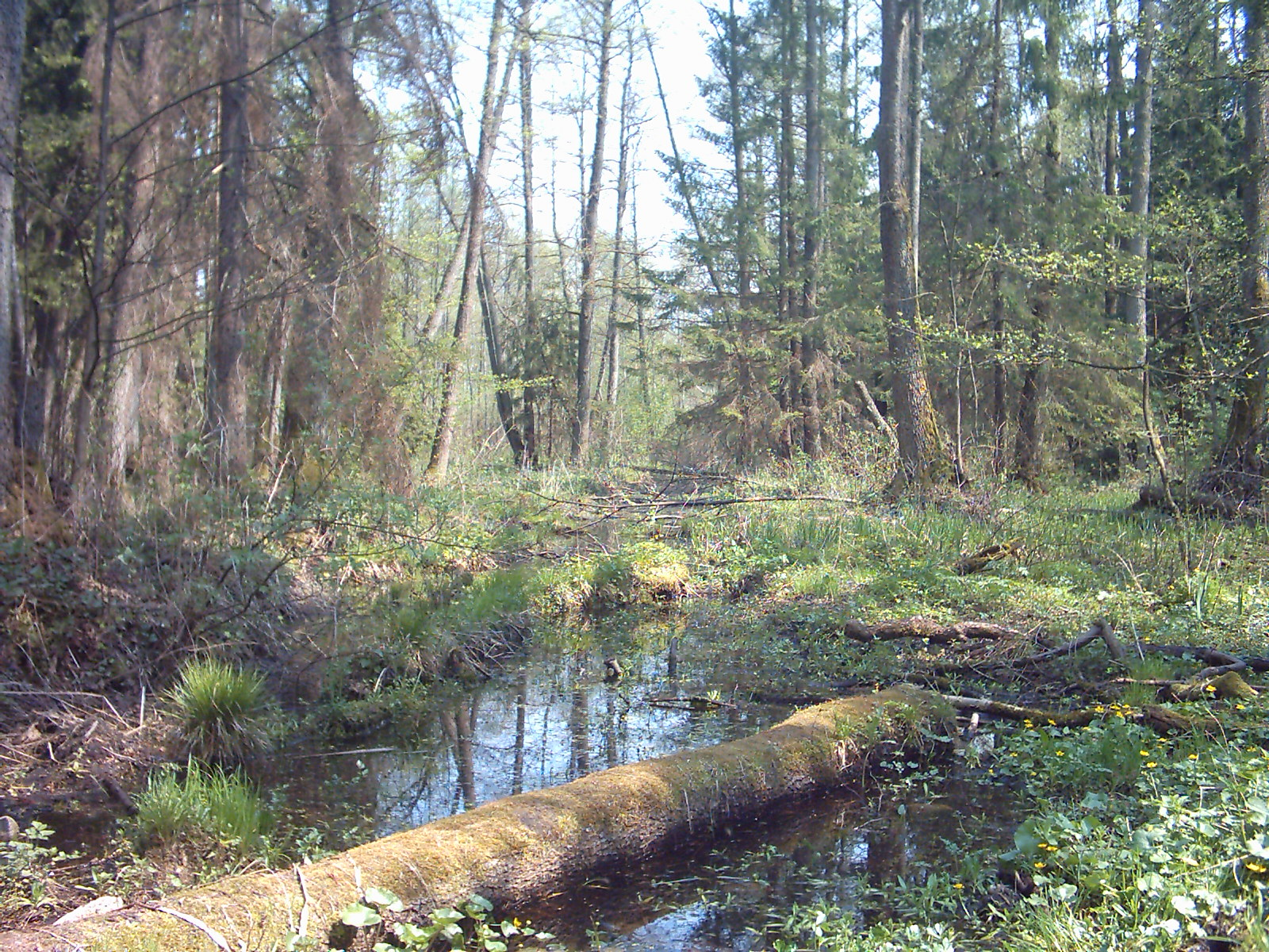 Miedna-dopływ Leśnej Prawej (trasa Hajnówka -Białowieża)